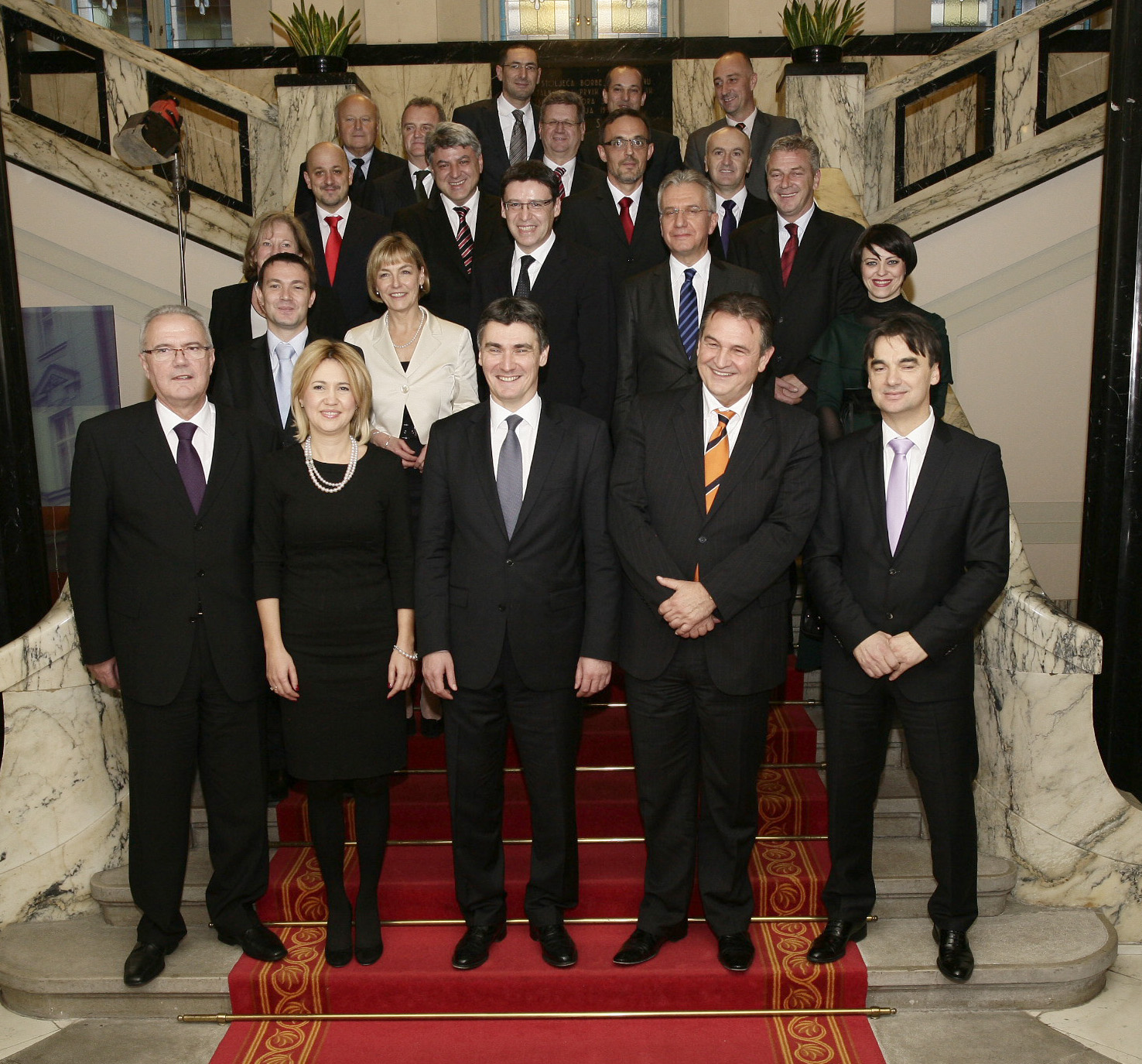 Službena fotografija 12. Vlade Republike Hrvatske.